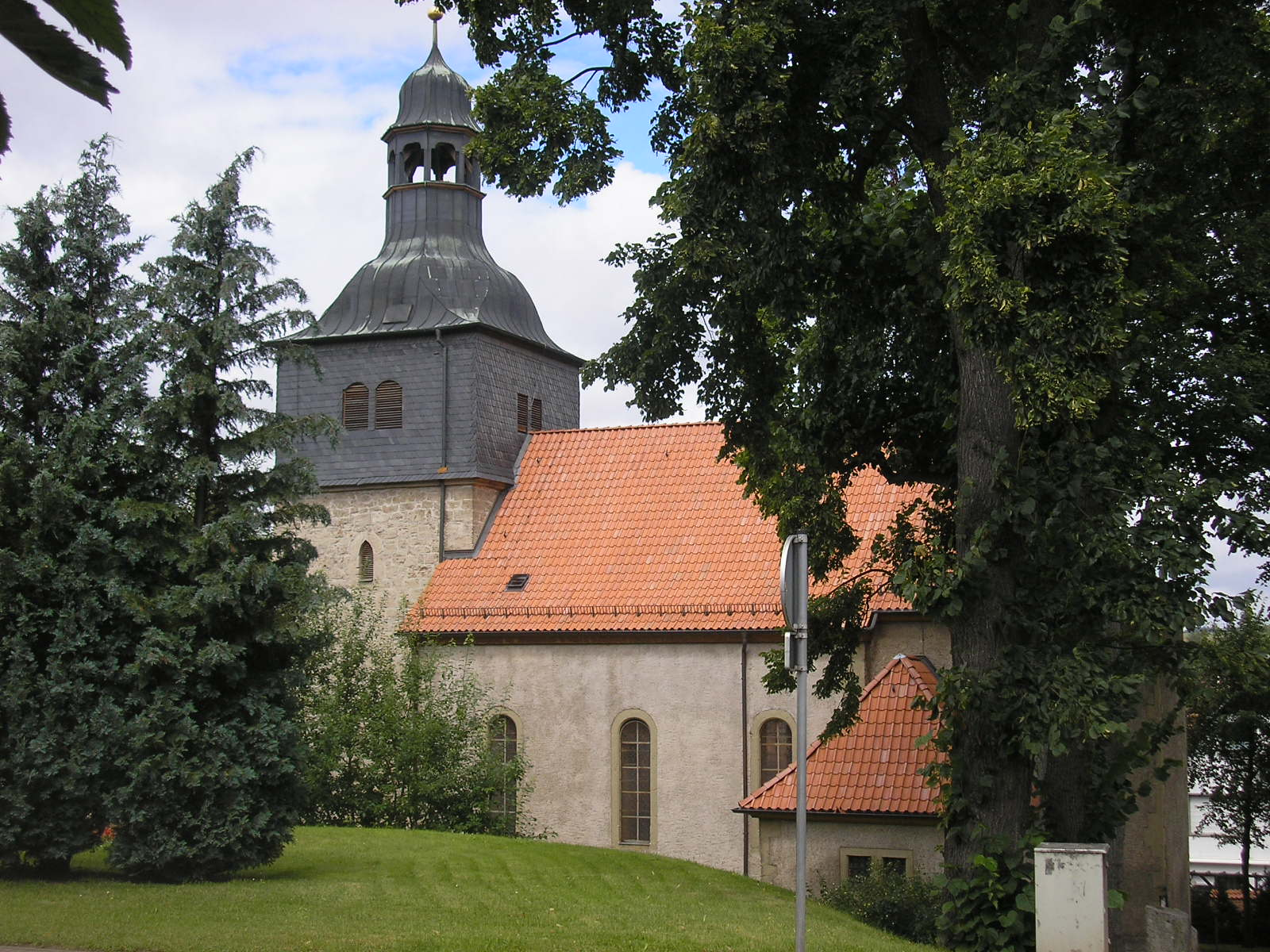 Die alte Dorfkirche in Leinefelde (Thüringen).